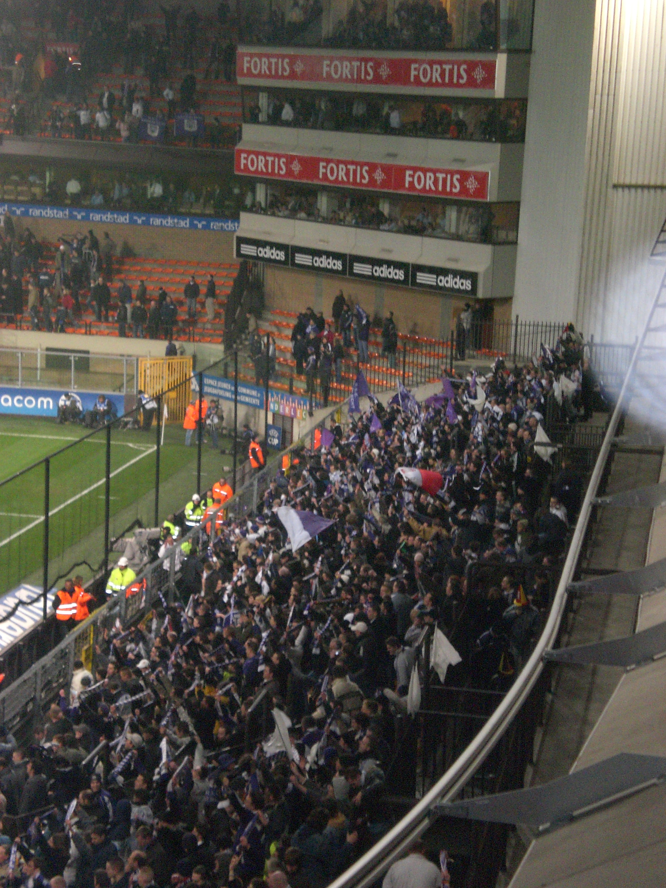 La tribune 4 du Stade Constant Vanden Stock, stade du Royal Sporting Club Anderlecht. Photo prise le 13/02/08, lors du 1/16ème de finale du la coupe UEFA entre le RSC Anderlecht et les Girondins de Bordeaux (2-1).